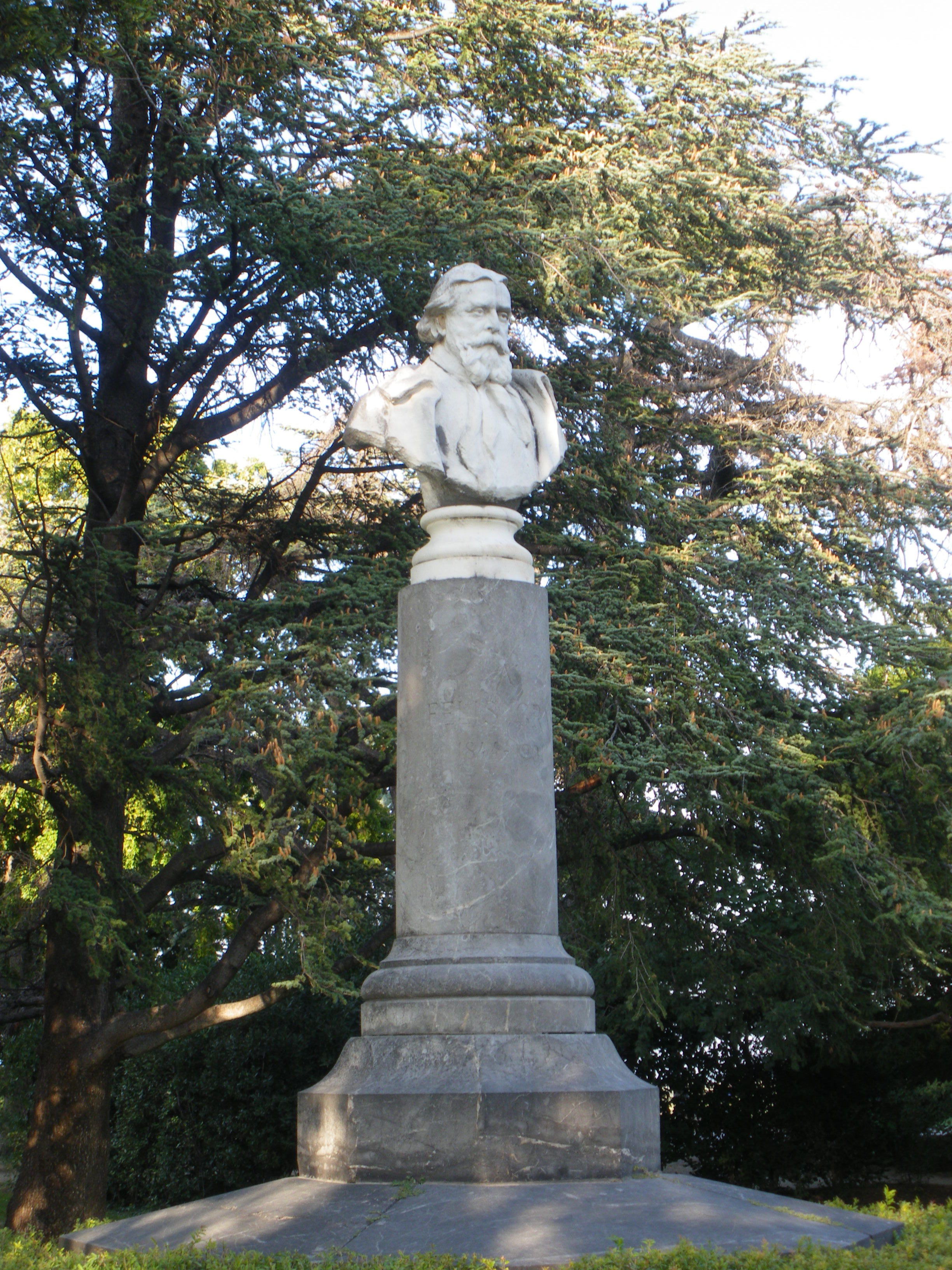 Statue de Felis Gras dans le Jardin des Doms, Avignon, Vaucluse, France